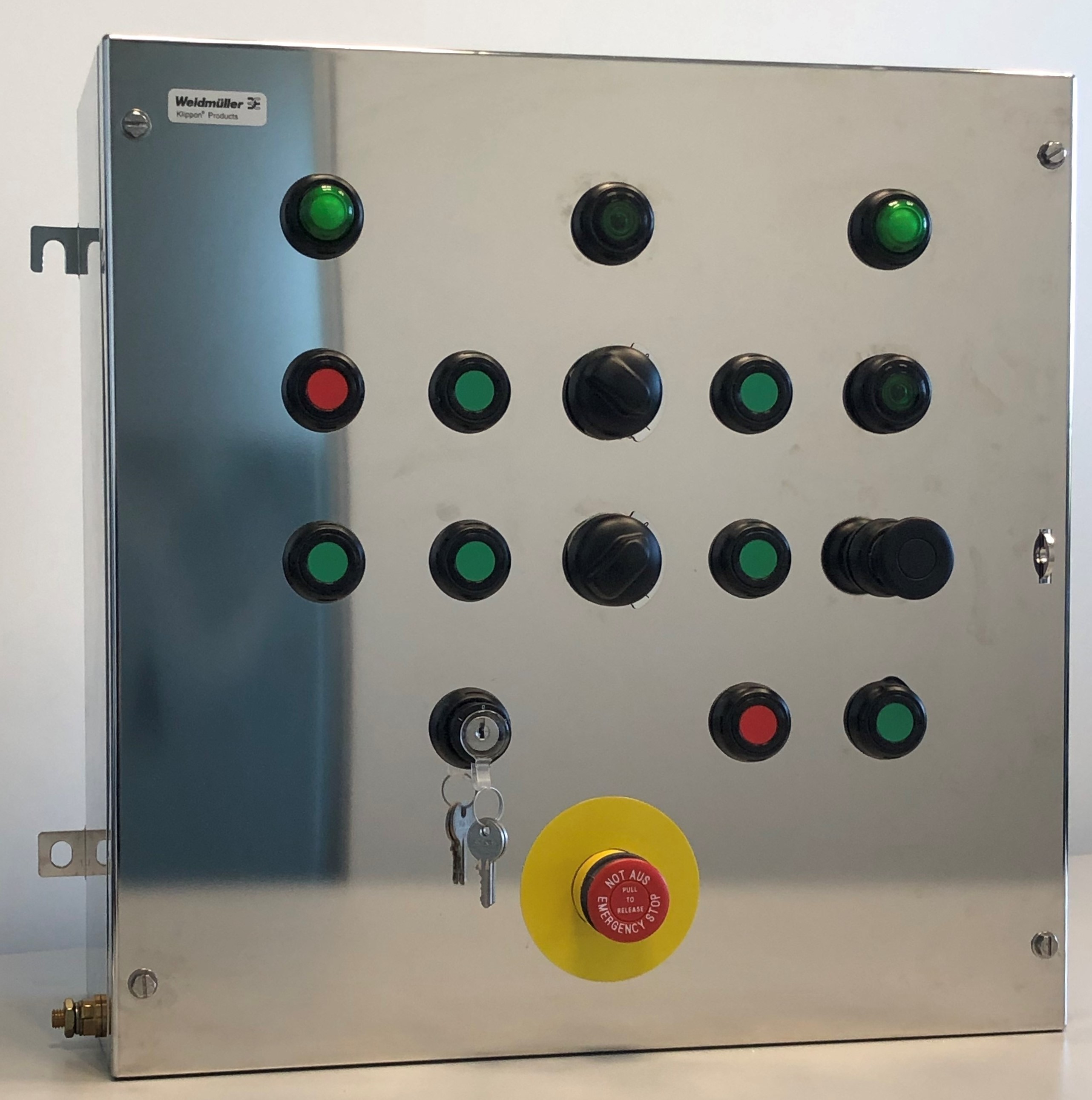 Schaltschrank, Enclosure, Steuerschrank, control station, control switch, Klemmkasten, Terminal box, Ex-konform, Explosion approval, hazardous area, KTB, IP66, NEMA 4X, elektropoliert, electro polished